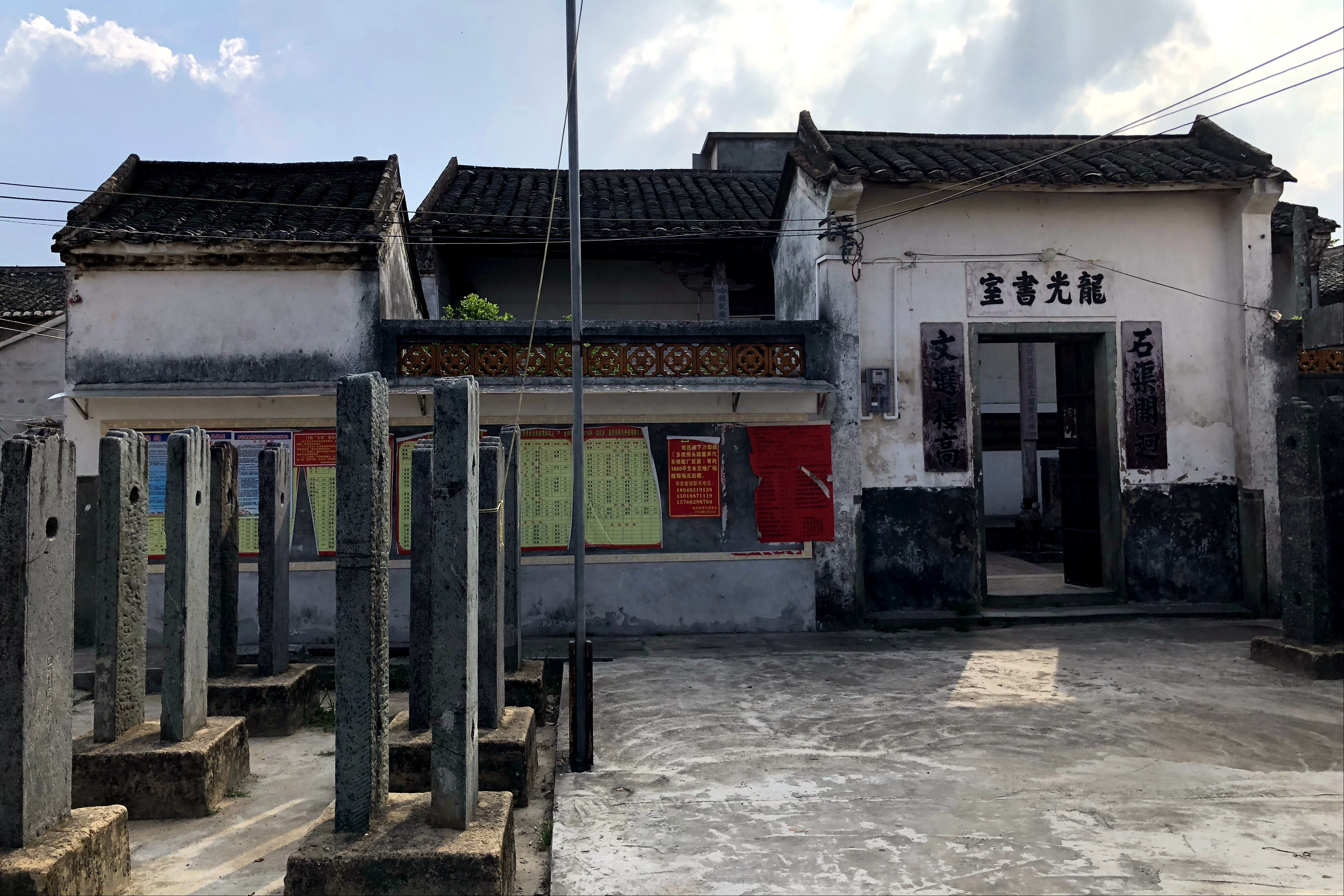 皇思扬村 龙光书室。